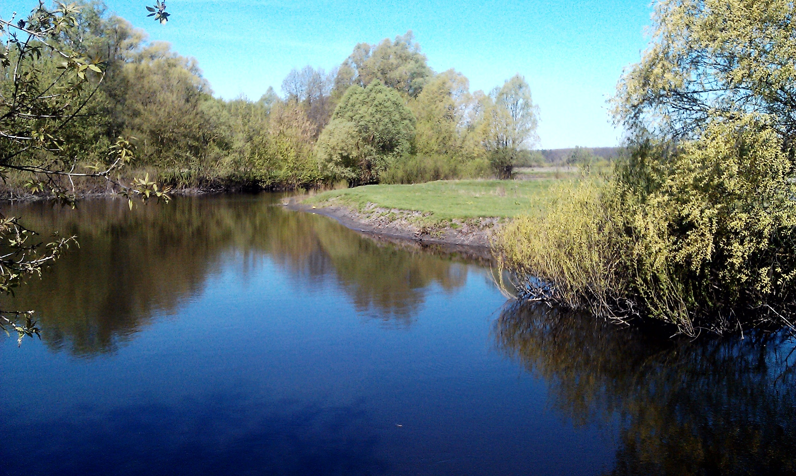 Сула з мосту